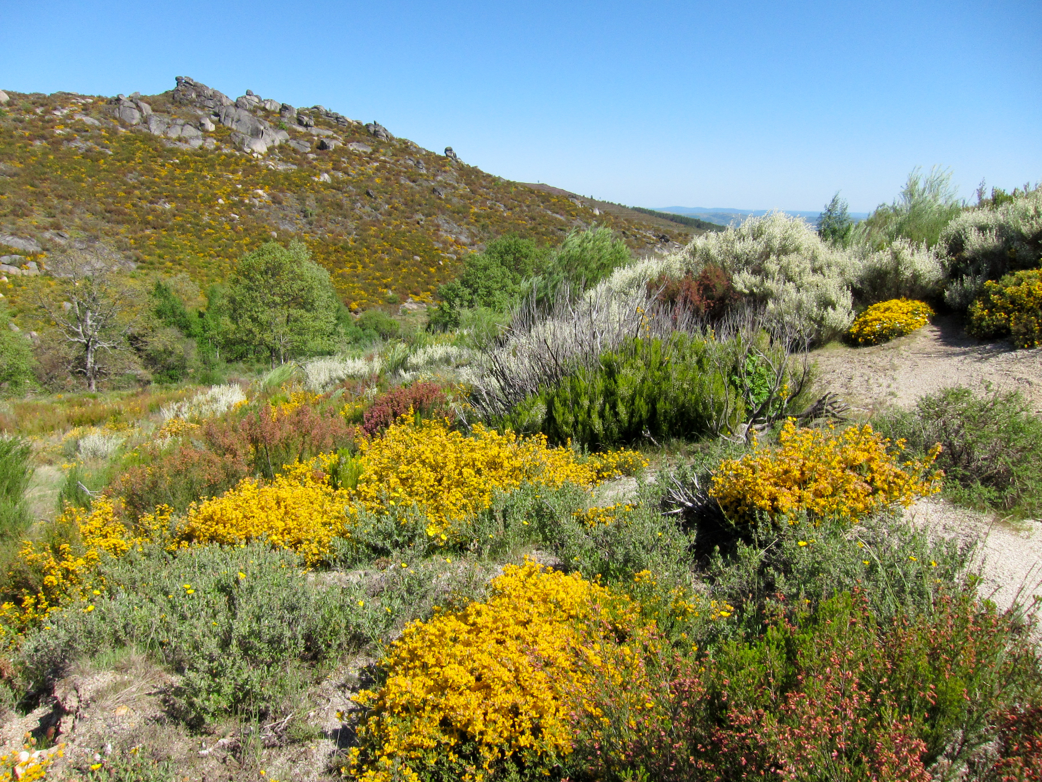 Parque Natural de Montesinho Porto Furado trail